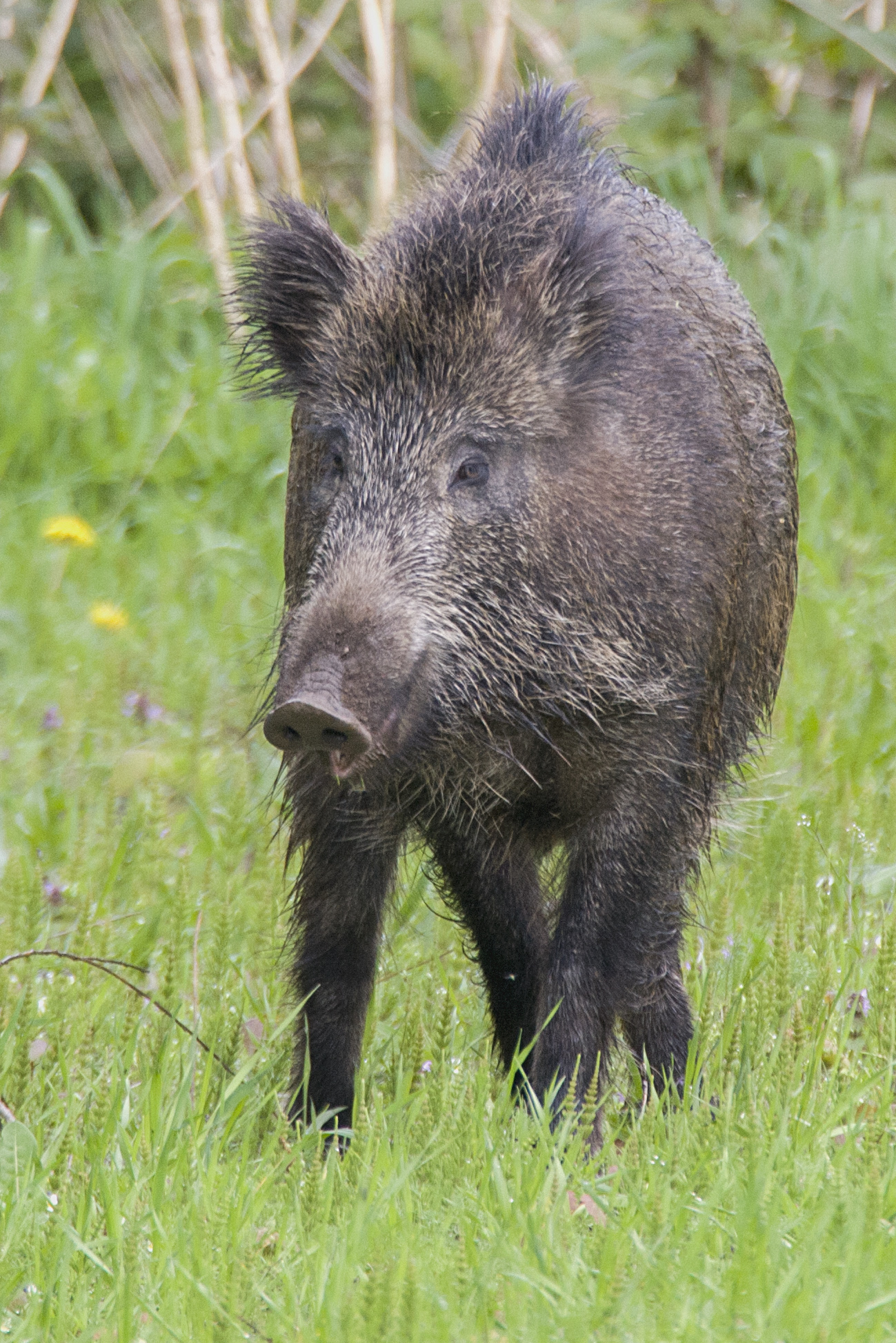 Dziki na obrzeżu Łodzi